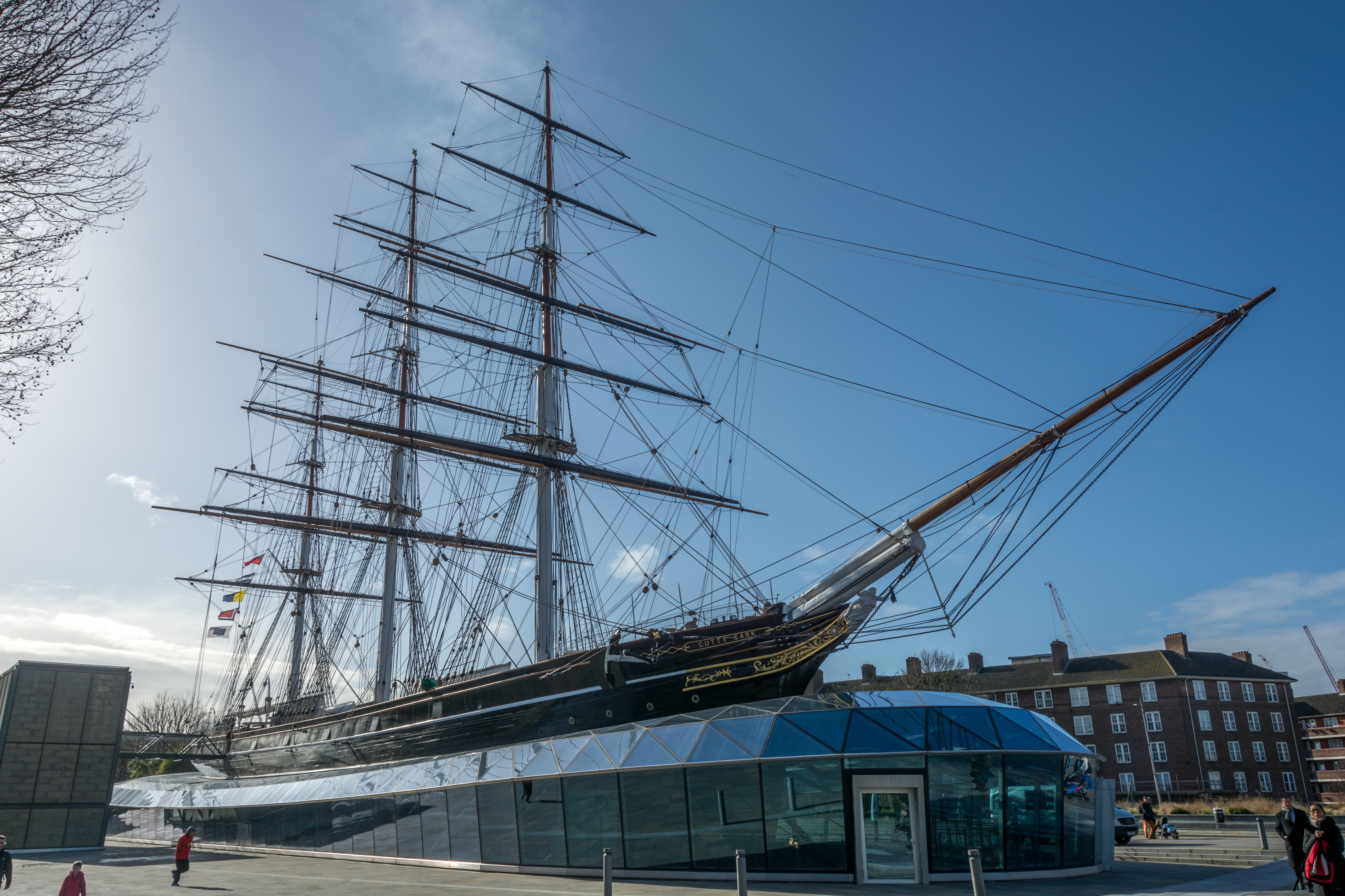 Londyn